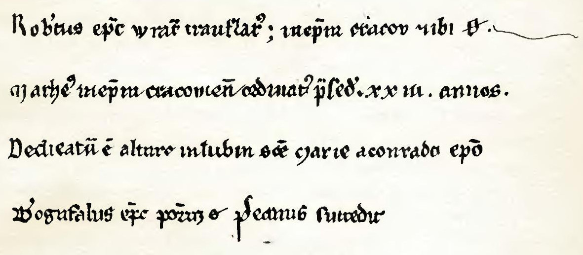 Rocznik lubiński. Rękopis berliński, biblioteka Uniwersytetu w Tybindze, folio 321.